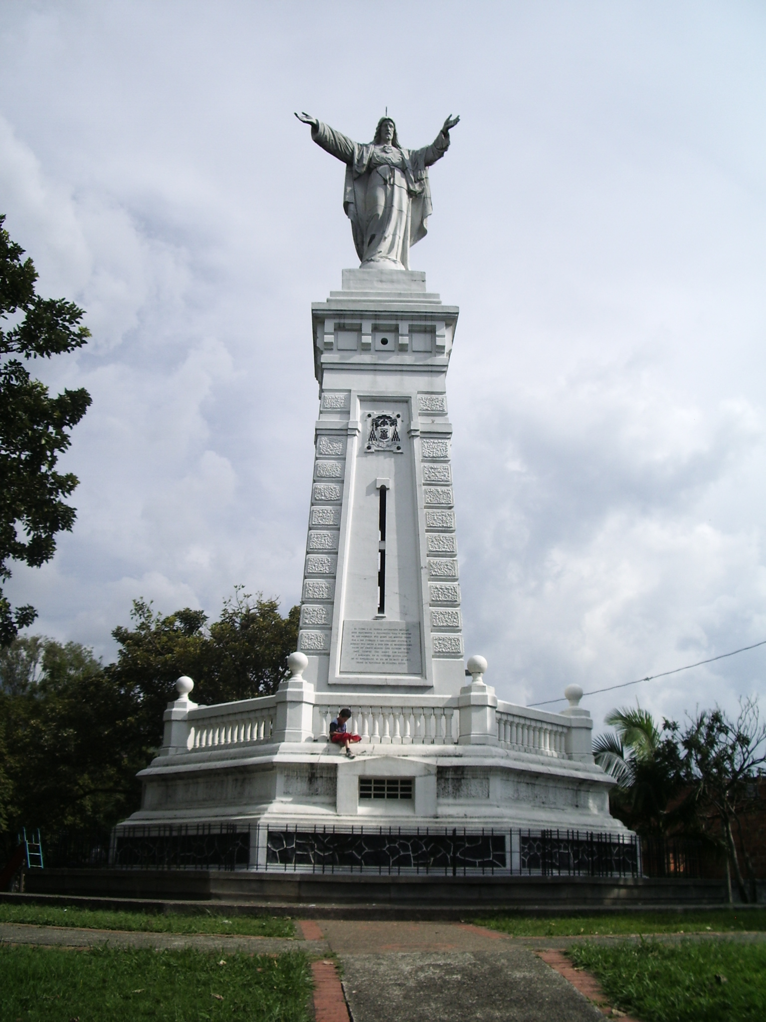 Escultura del Corazón de Jesús realizada en Italia y construida en mármol de carrara, restaurada por la fundación Ferrocarril de Antioquia. Se encuentra localizada en el morro del barrio El Salvador en Medellín.